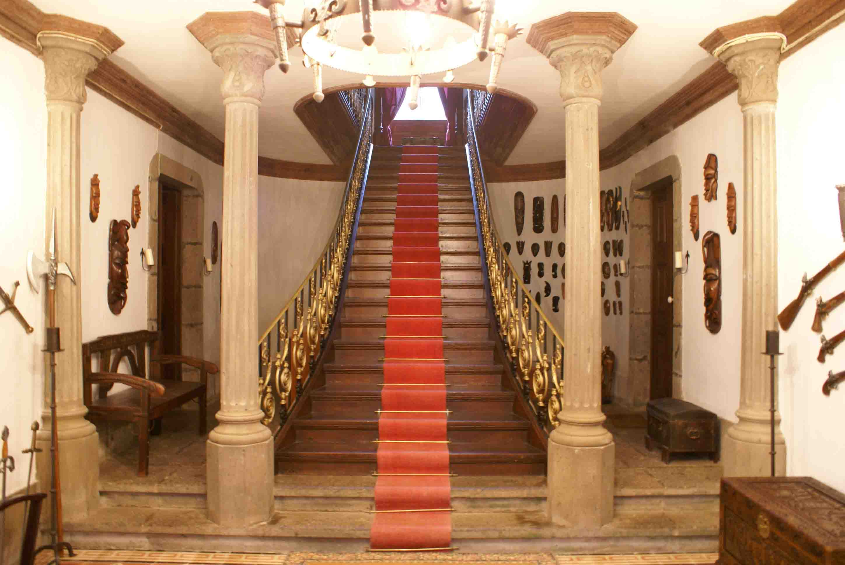 Villa Maria, saguão, Angra do Heroísmo, ilha Terceira, Açores, Portugal.